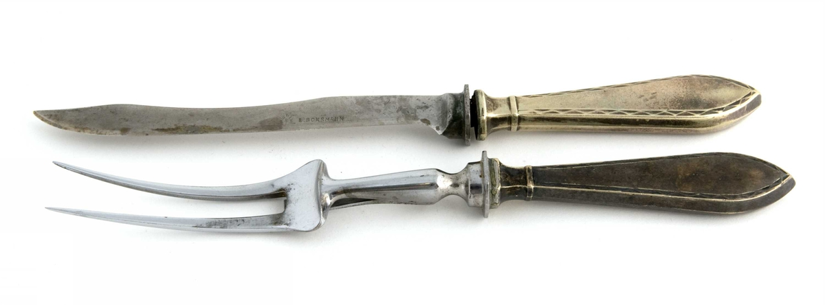 Forskjærbestikk fra ca 1810 i stål med skaft av sølv. Foto Anne-Lise Reinsfelt / Norsk Folkemuseum, NF.1983-1164AB.